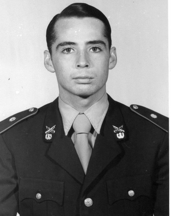 Imagen del Teniente Roberto Estévez.